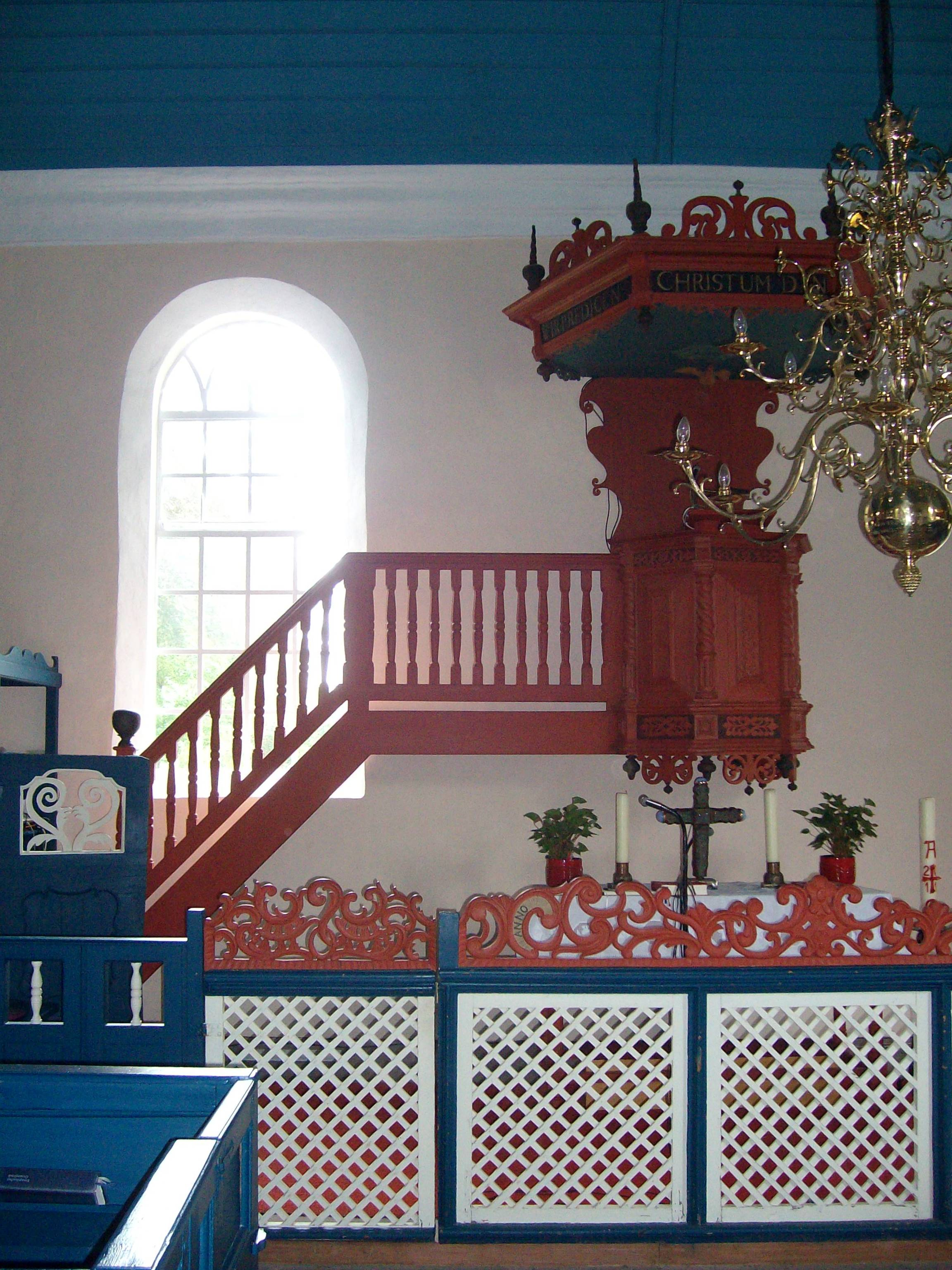 Kanzel der Reformierten Kirche in Hatshausen